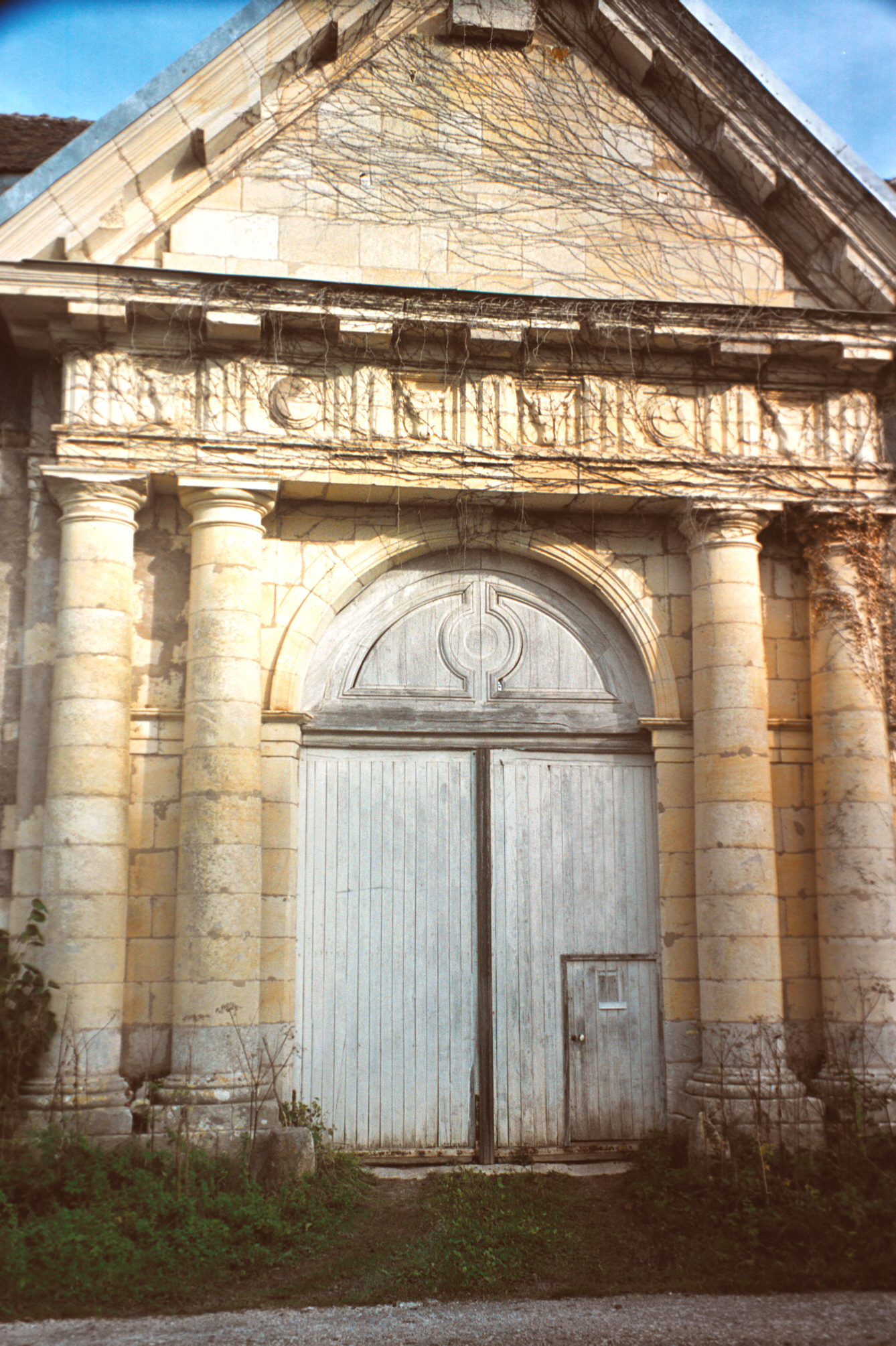 Portail de la chartreuse Bellary (Nièvre) en 2002.